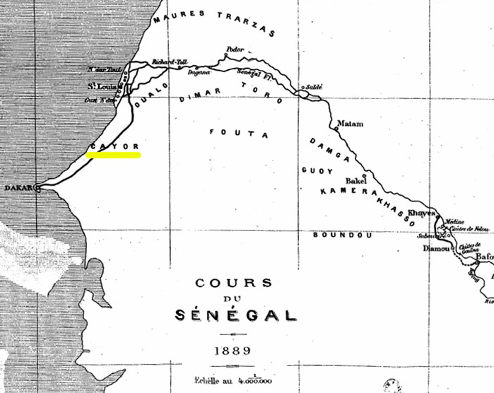 Localisation du Cayor sur une carte du fleuve Sénégal (1889) dans Eugène Béchet, Cinq Ans de séjour au Soudan français, E. Plon, Nourrit, Paris, 1889, après la page 270